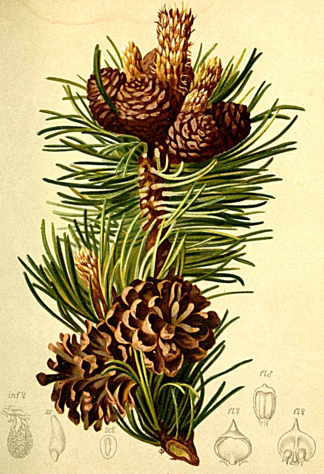 Pinus montana (Pinus mugo)